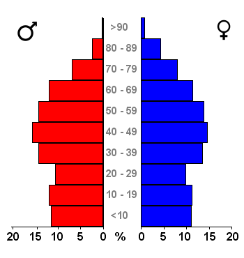 Age pyramids for the 443 municipalities in the Netherlands. Data 2007. Statistics provided by Centraal Bureau voor de Statistiek, Voorburg/Heerlen. Source: Tabel: Bevolking Nederland per gemeente en diverse regio's naar leeftijd, geslacht en burgerlijke staat, 1 januari 1988-2007. Gewijzigd op 24 mei 2007 (on-line database StatLine) Bevolkingspiramide - Gemeente Hoogezand-Sappemeer (2007).png